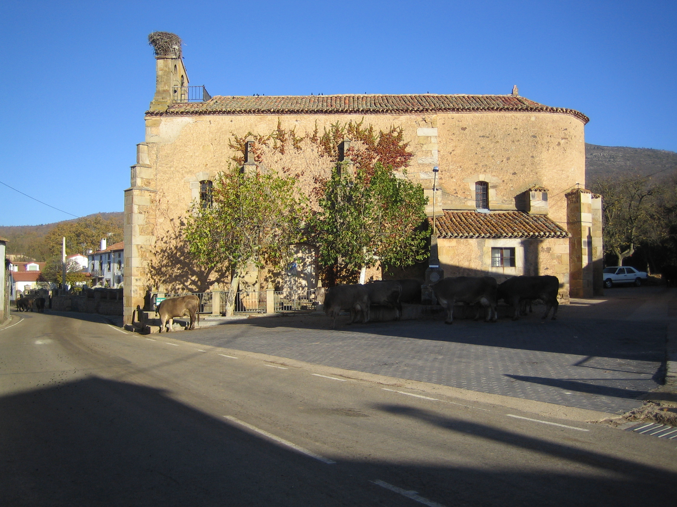 Rollamienta, iglesia parroquial